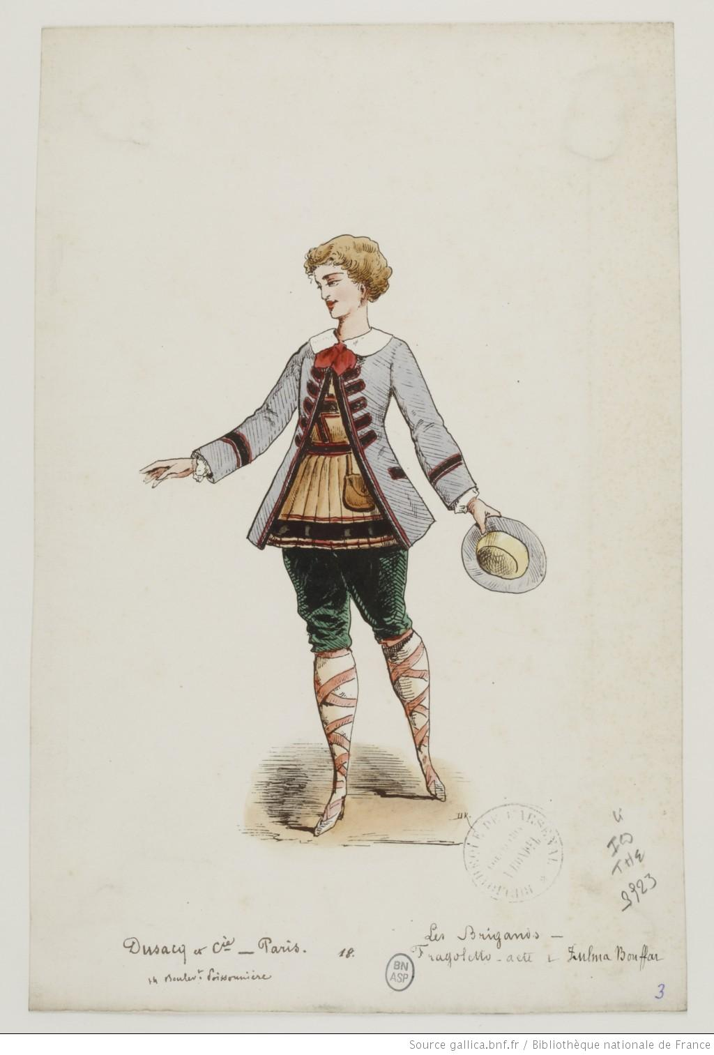 Les Brigands, costume de Fragoletto